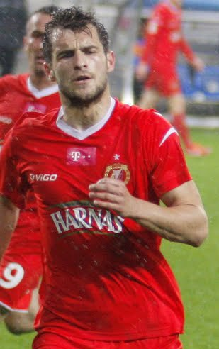 Łukasz Broź w barwach Widzewa Łódź